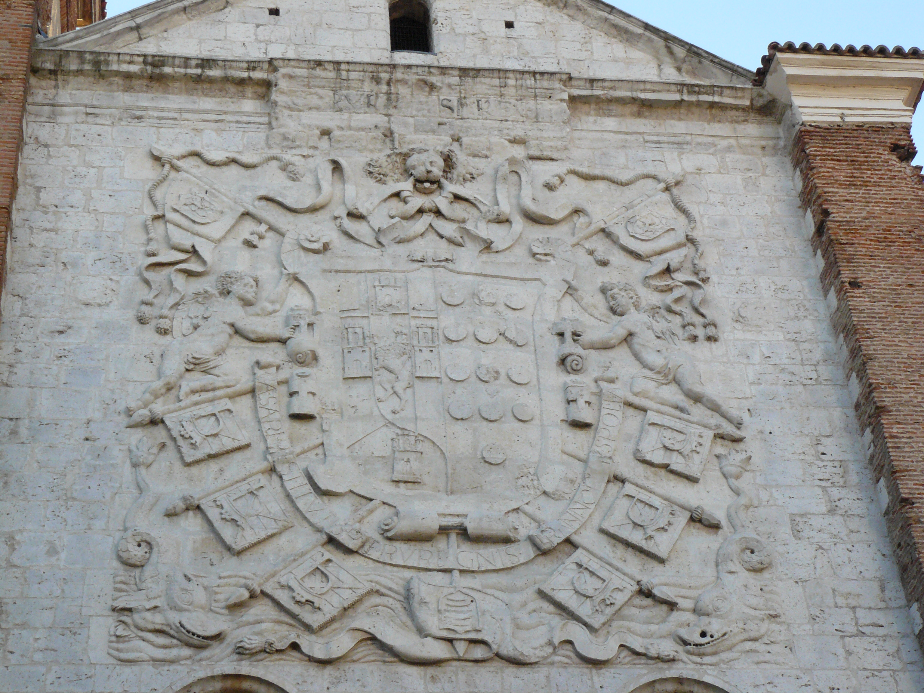 Monasterio de las Huelgas Reales, Valladolid.